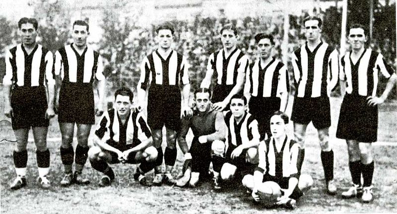 Calciatori della Fiorentina nel 1928 con la sua seconda maglietta.